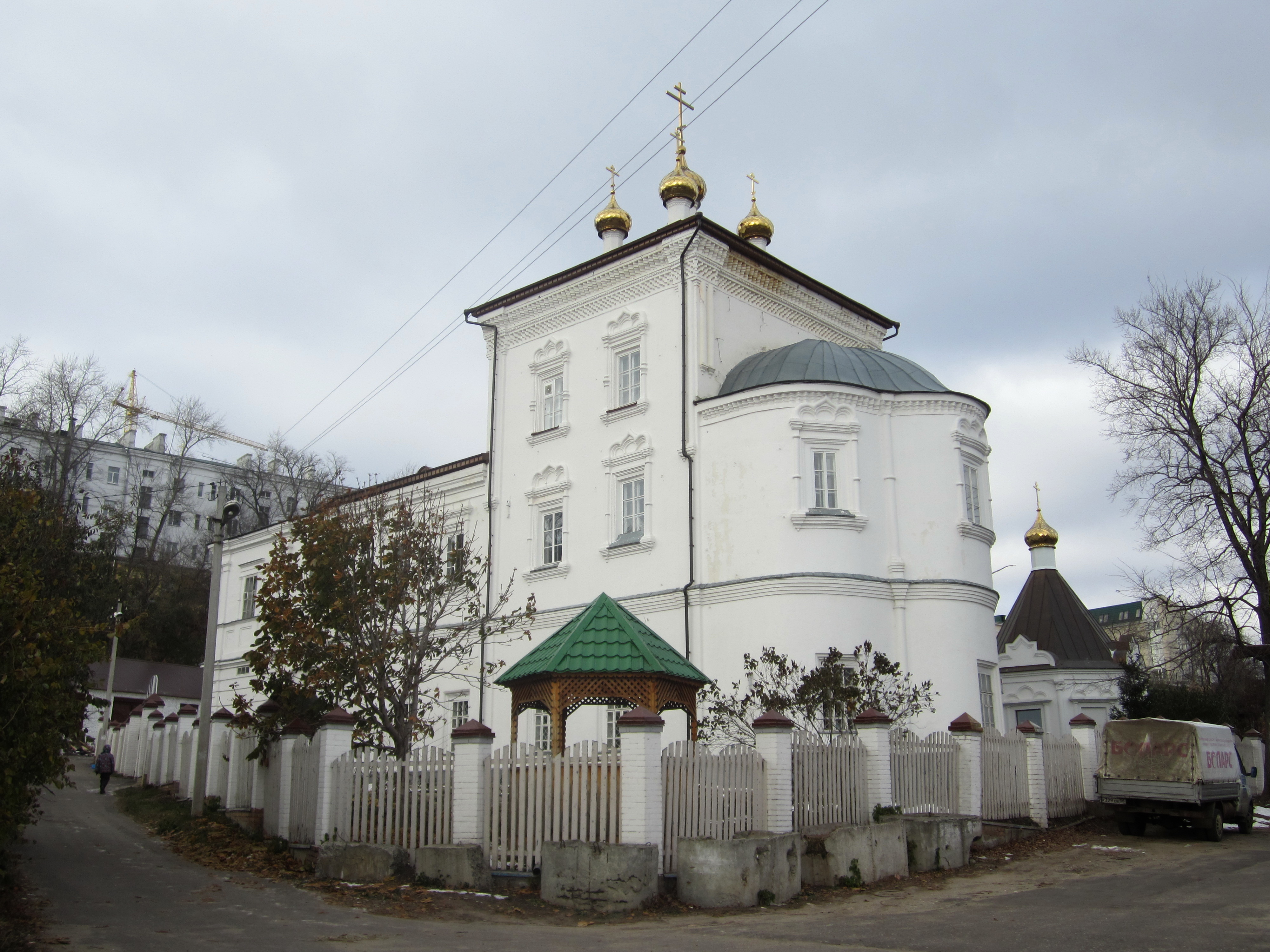 Спасо-преображенская церковь (Пензенская область, Пенза, гоголевский переулок, 6-а)